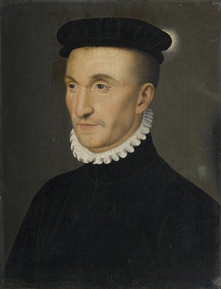 Henri II, called Henri d'Albret (* 1503; † 1555), king of Navarre